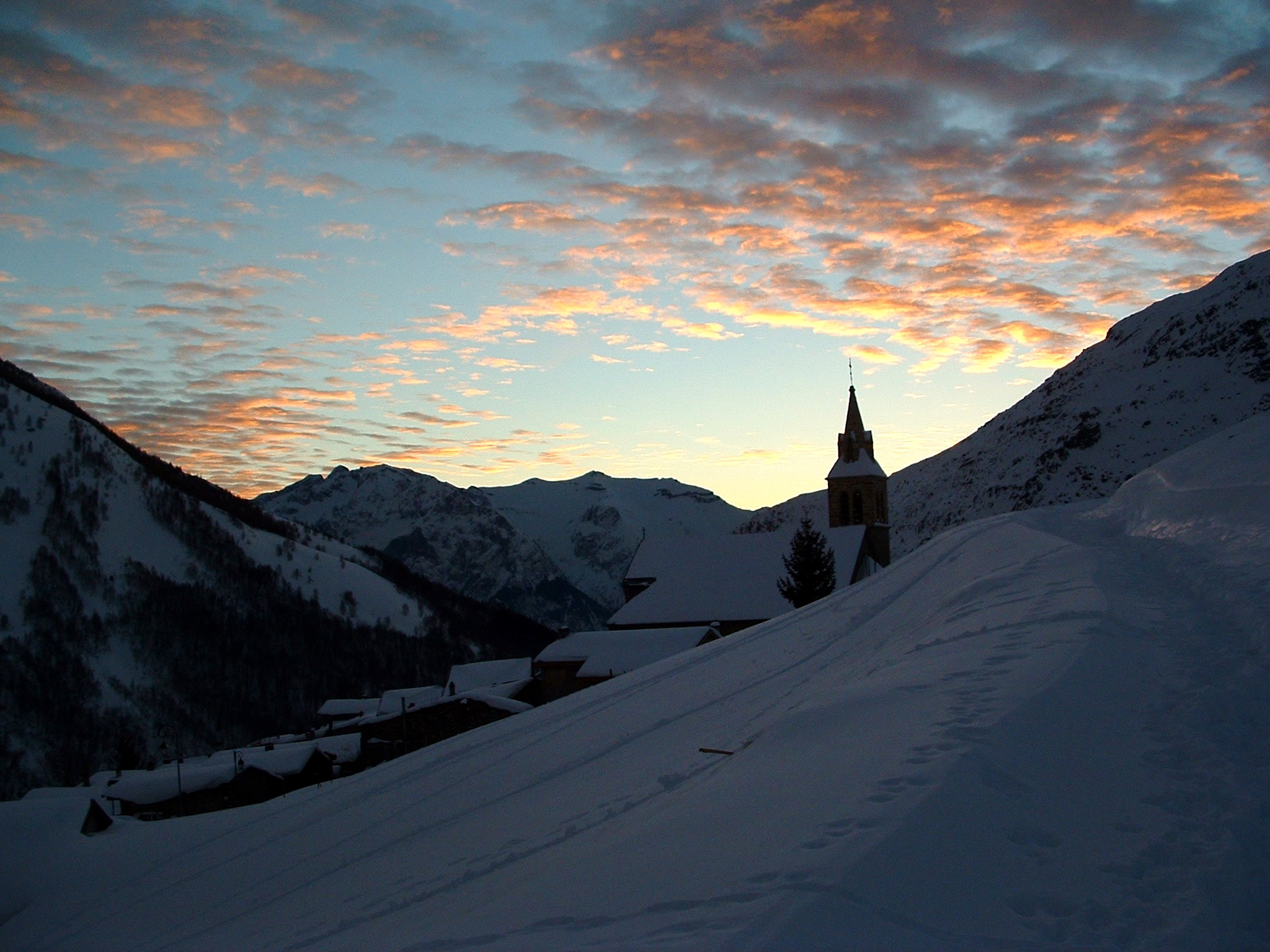 Un ciel embrasé dans les Alpes - France